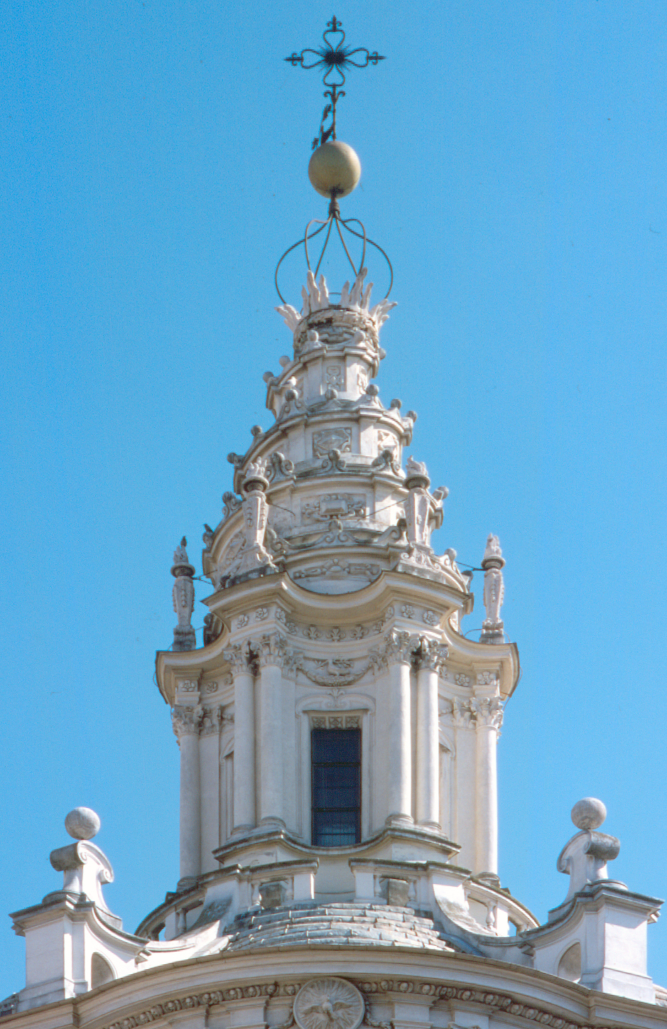 Cupola di Sant'Ivo alla Sapienza